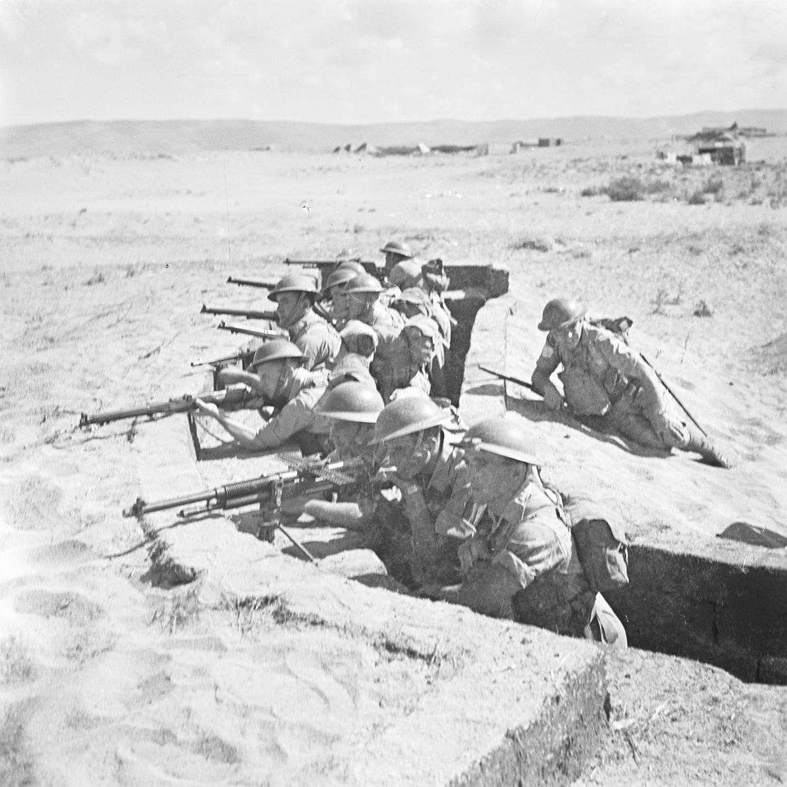 אוסף צילומים של הצלם זולטן קלוגר טווח מספרי התשלילים 19461 - 19488: Buffs, Company 8 באפס, פלוגה 8